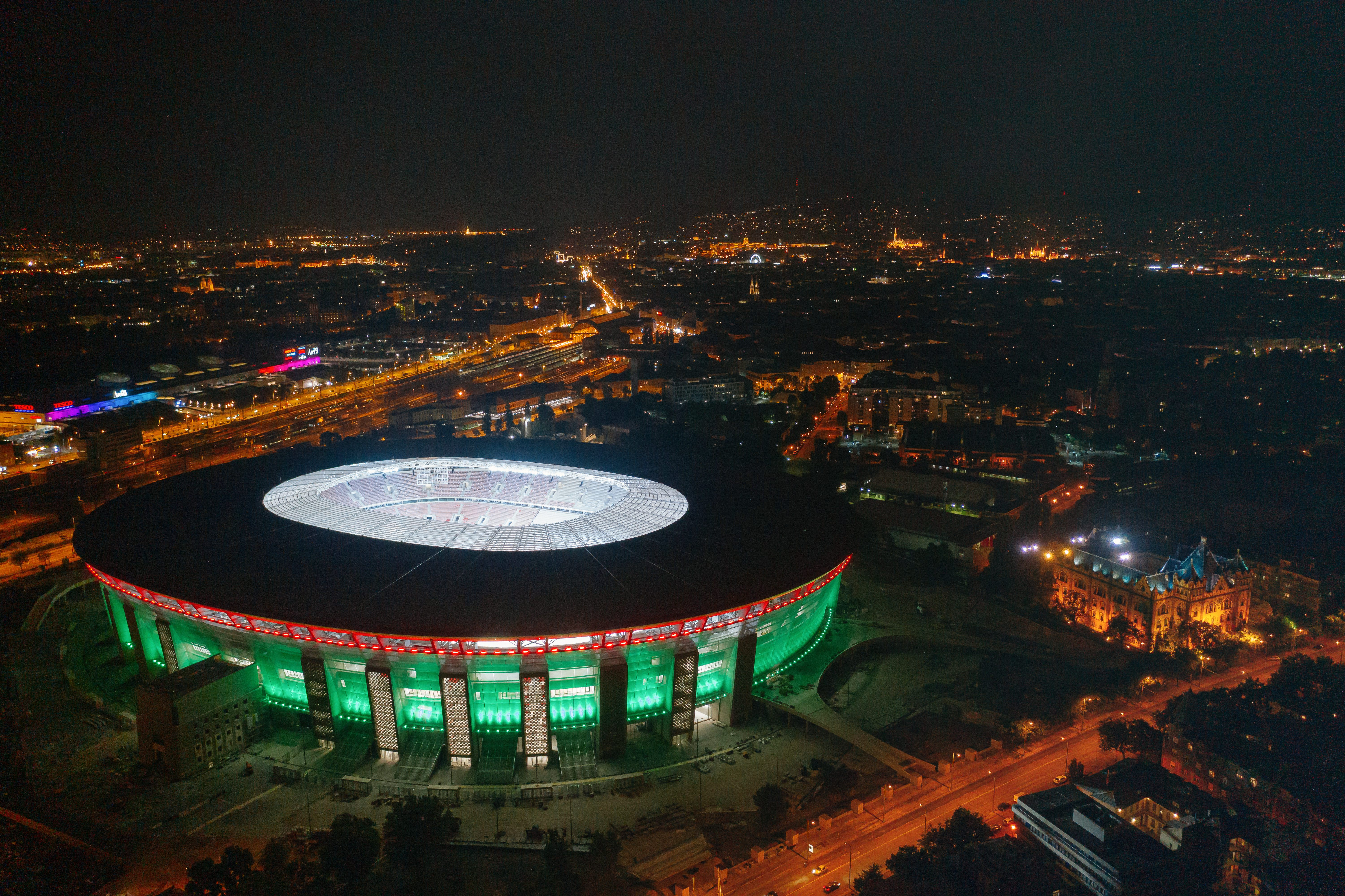 A Puskás Aréna éjszakai légi felvétel